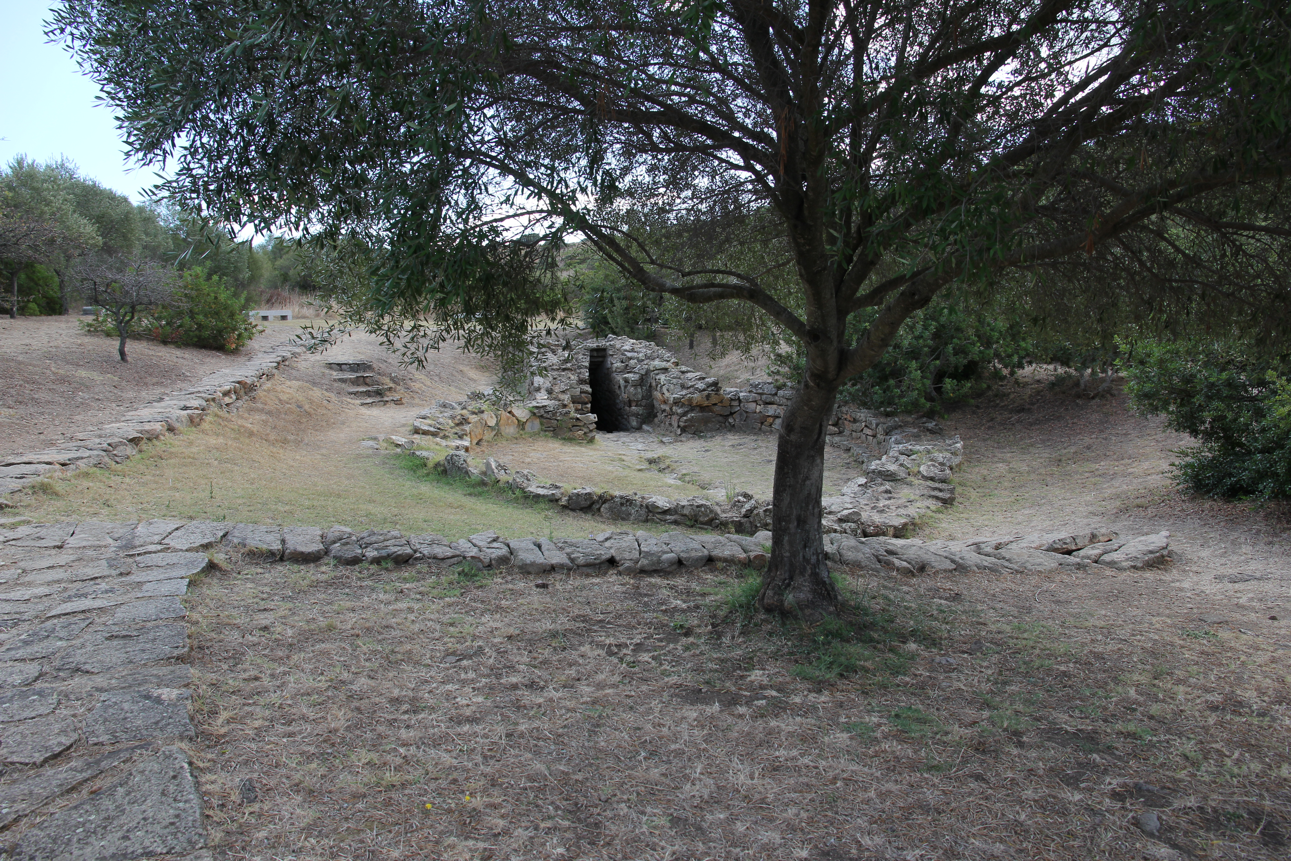 Pozzo sacro di Sa Testa